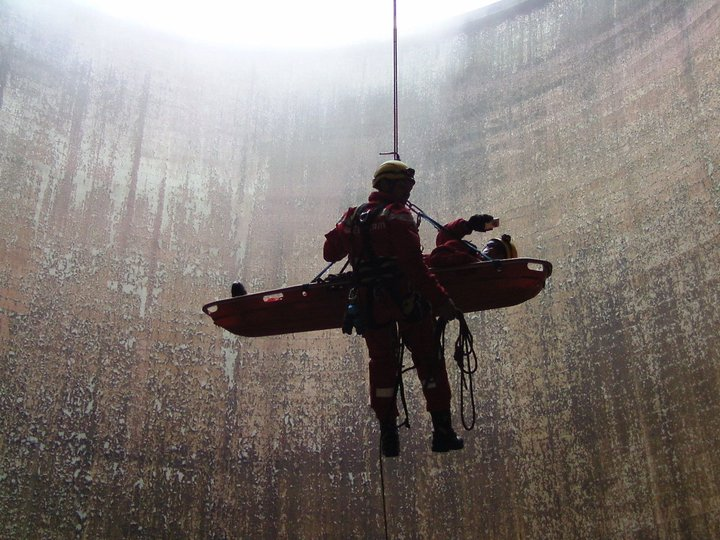 oefening REDteam antwerpen